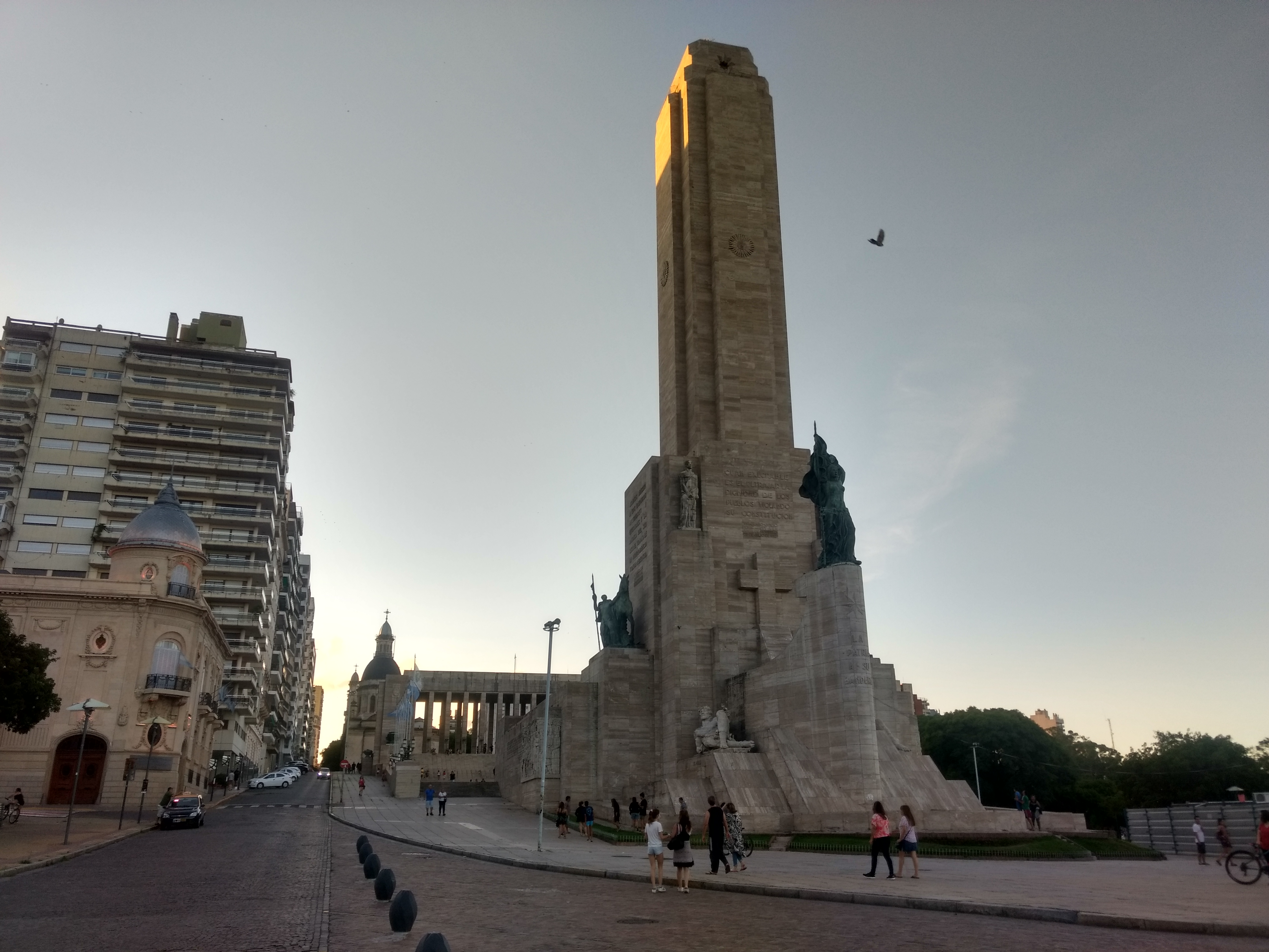 Vista del monumento nacional a la bandera en la ciudad de Rosario, Argentina. También se ve el palacio Vasallos, consejo municipal.